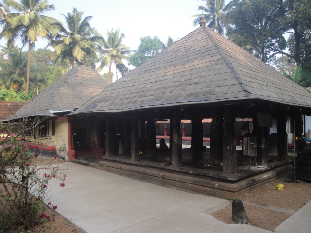 തിരുവല്ല തിരുവാറ്റാ മഹാദേവക്ഷേത്രം